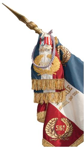 Etendard et sa cravate